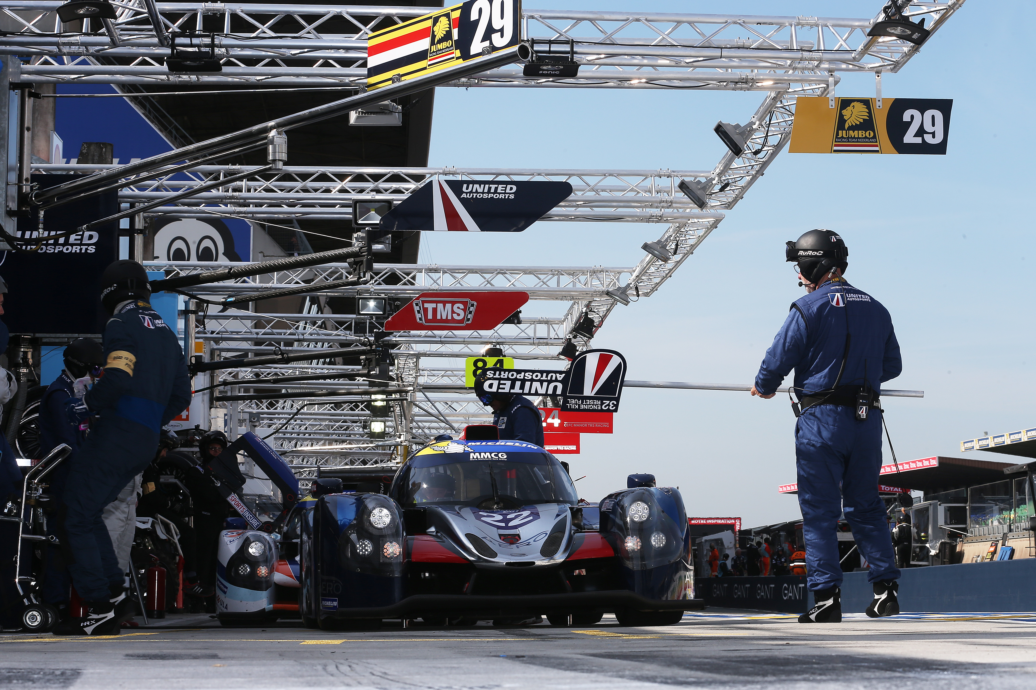 United Autosport lors des 24 Heures du Mans 2017.